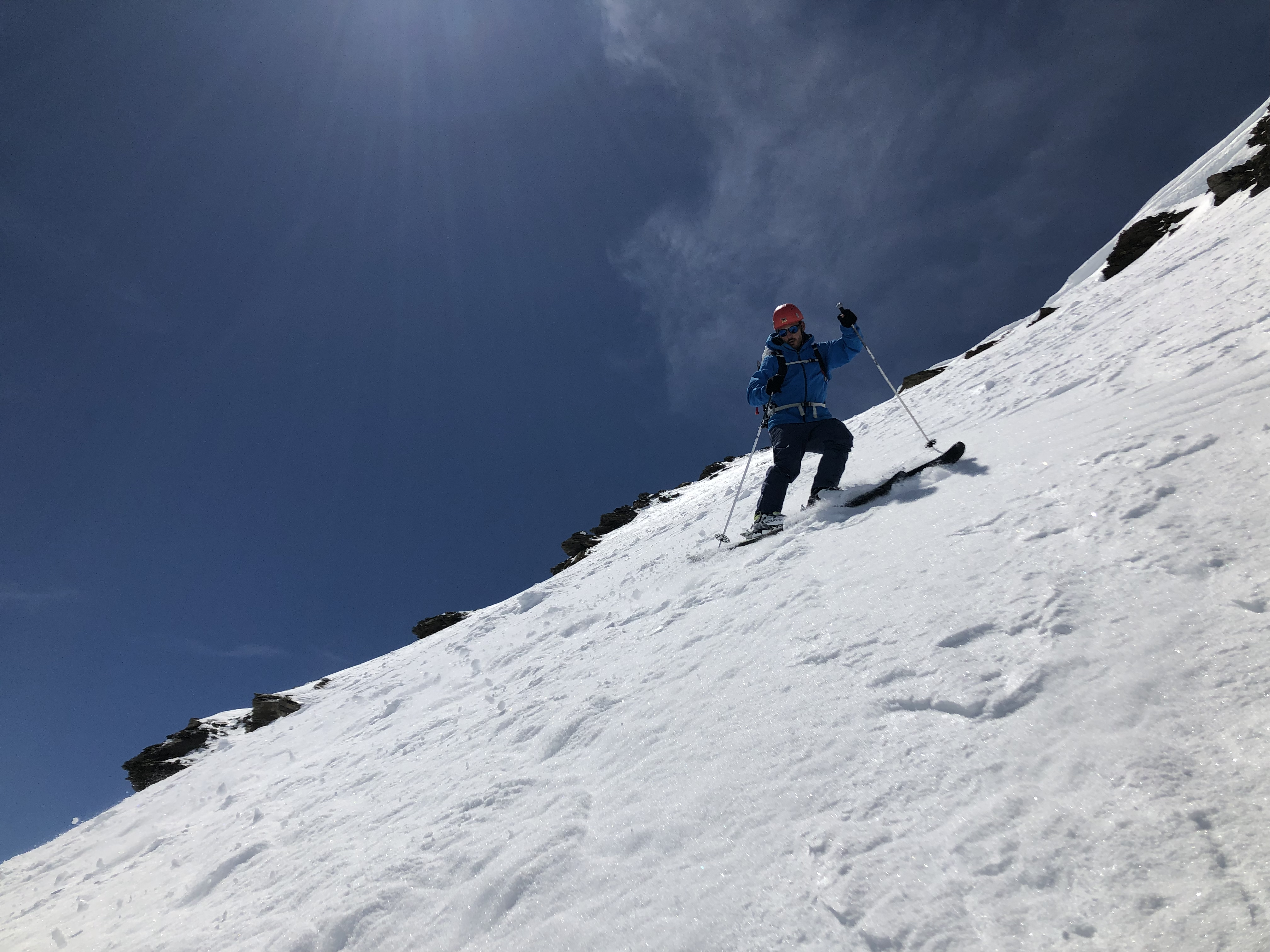 Francesco Cassardo scia sul monte Gasherbrum